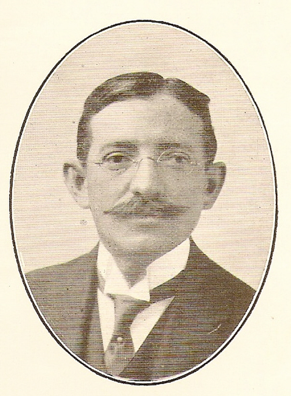 Fotografía escaneada de don Gonzalo Cámara Zavala fundador de la Liga de Acción Social en Mérida Yucatán México tomada de un archivo público. Fotografía de 1895.